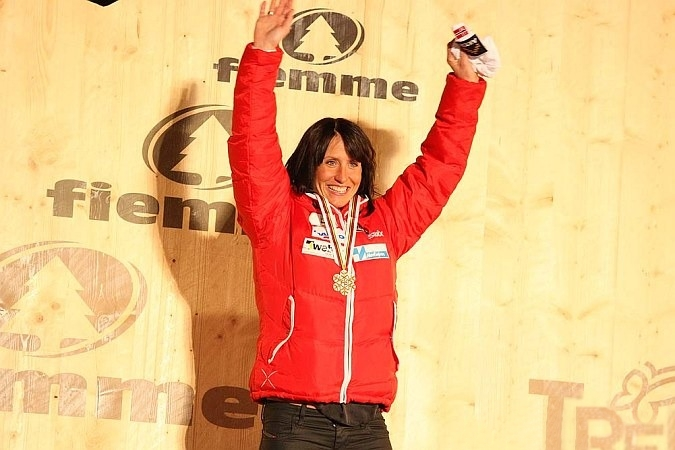 Dekoracja medalowa biegu indywidualnego kobiet na 30 km techniką klasyczną